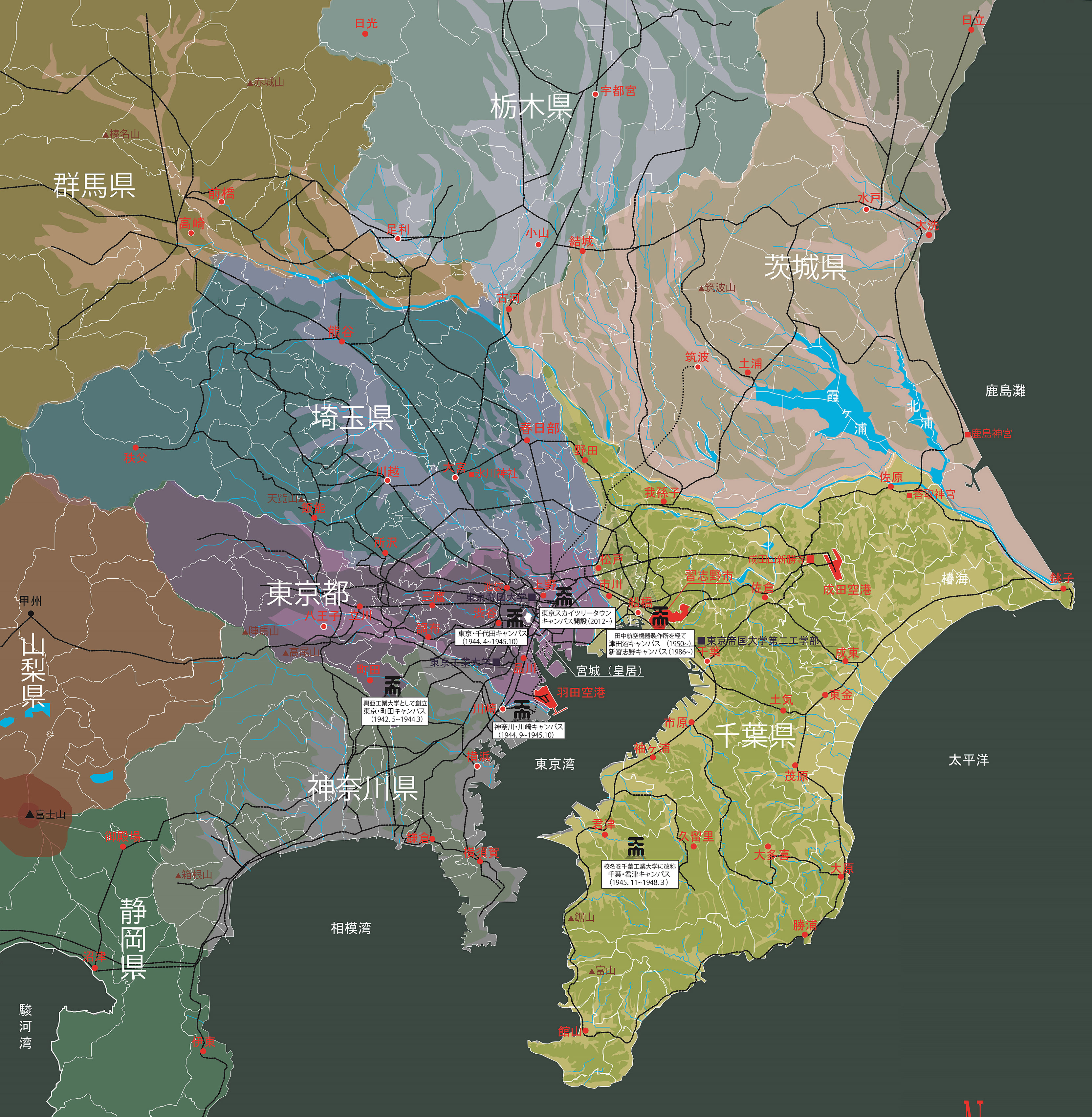 千葉工業大学（旧・興亜工業大学）の沿革を地図上に示したマップ